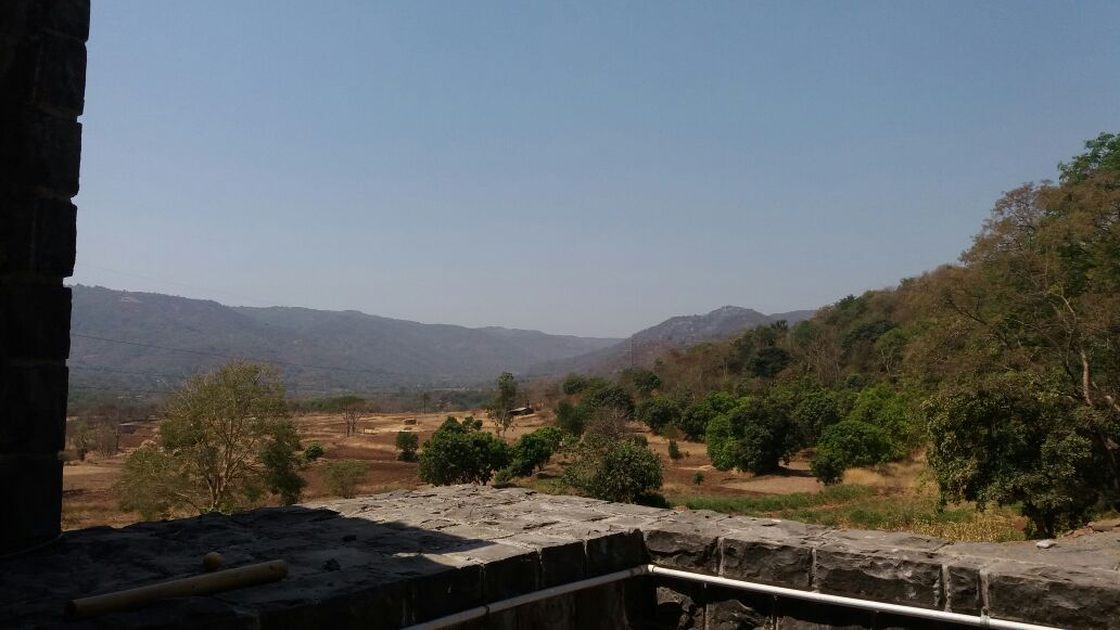 खारावडे